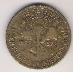 Uma moeda de 1000 Réis cunhada em 1922. This graphic was created with GIMP.